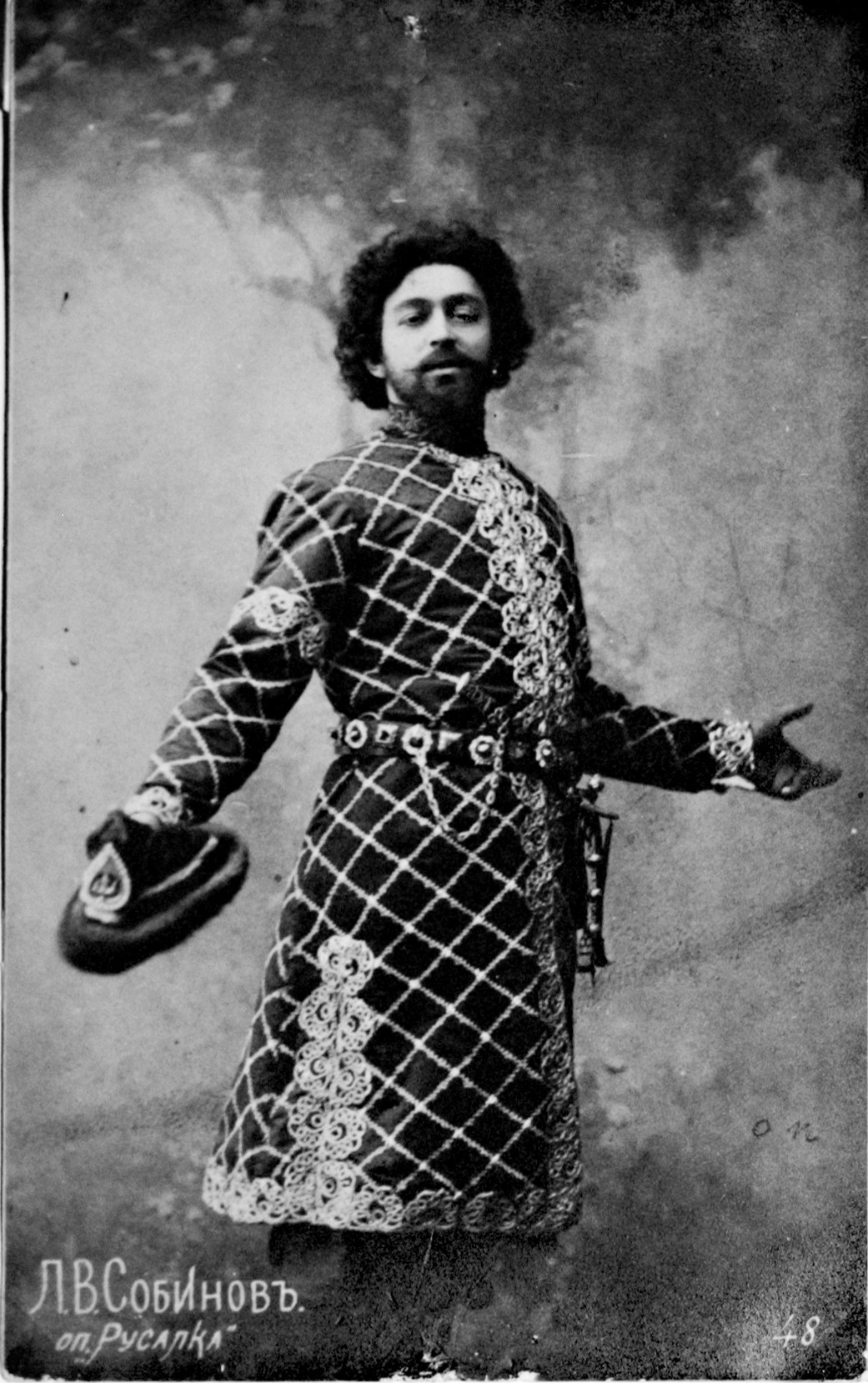 Л. В. Собинов в спектакле «Русалка»